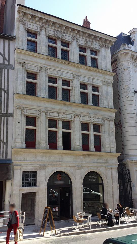 Maison d'un marchand d'Orléans de la Renaissance. Pierre. Restauration 2014. Rue Ducerceau Orléans.